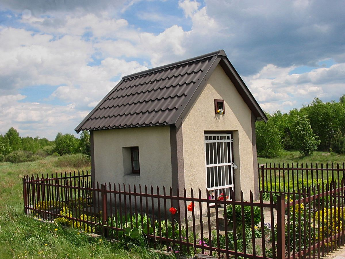 Kapliczka w Świerczku